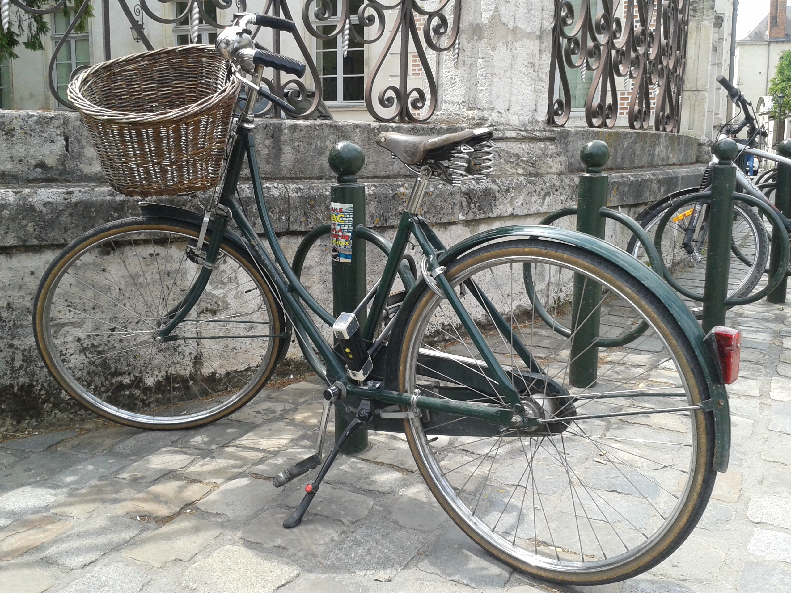 Pashley Princess.